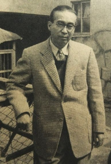 近衛秀麿